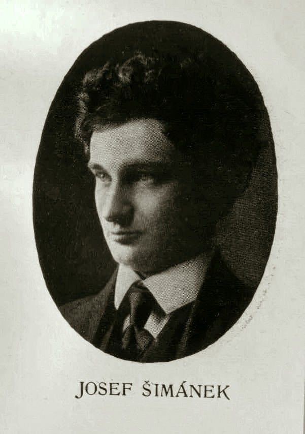 Josef Šimánek (1883 - 1959), Český básník, dramatik a prozaik.